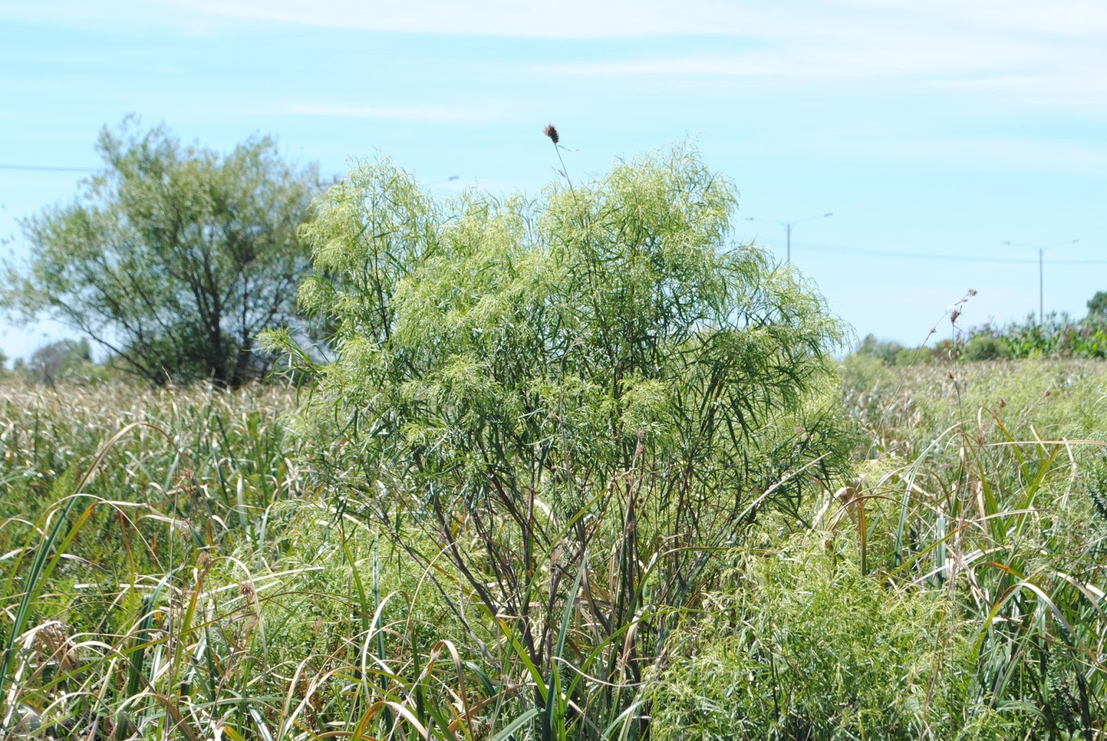 Eupatorium tremulum. Asteraceae. Fotos tomadas sobre arena húmeda al margen del Río de la Plata y en bañados al margen de la Ruta Interbalnearia en Colinas de Solymar, departamento de Canelones, Uruguay.